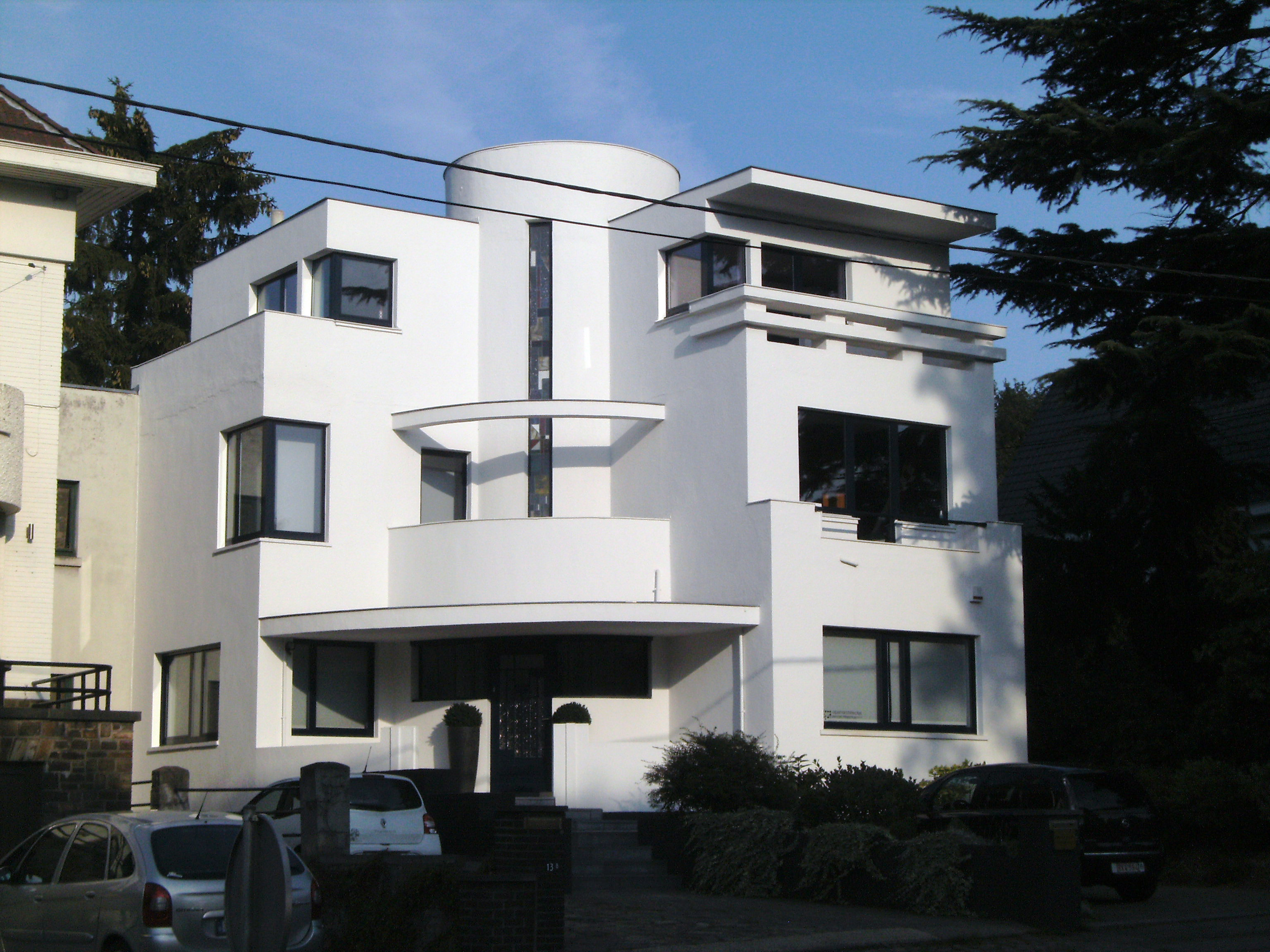 Loverval (Gerpinnes-Belgique) - chaussée de Philippeville, 13 - architecte Marcel Leborgne